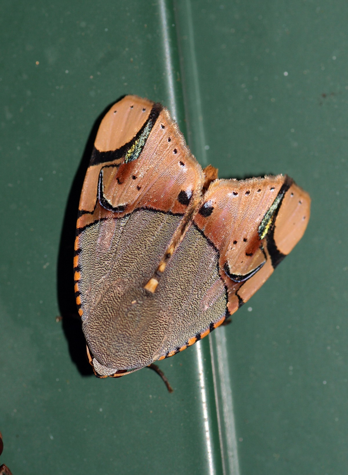 Malaysia. Fraser Hill. March, 2009 Geographical range: Sri Lanka, Andaman Is., Nepal, China (Fujian, Guangdong, Hong Kong, Hainan, Yunnan), Thailand, Malay peninsula, Java, Bali, Sulawesi, Borneo, Philippines.